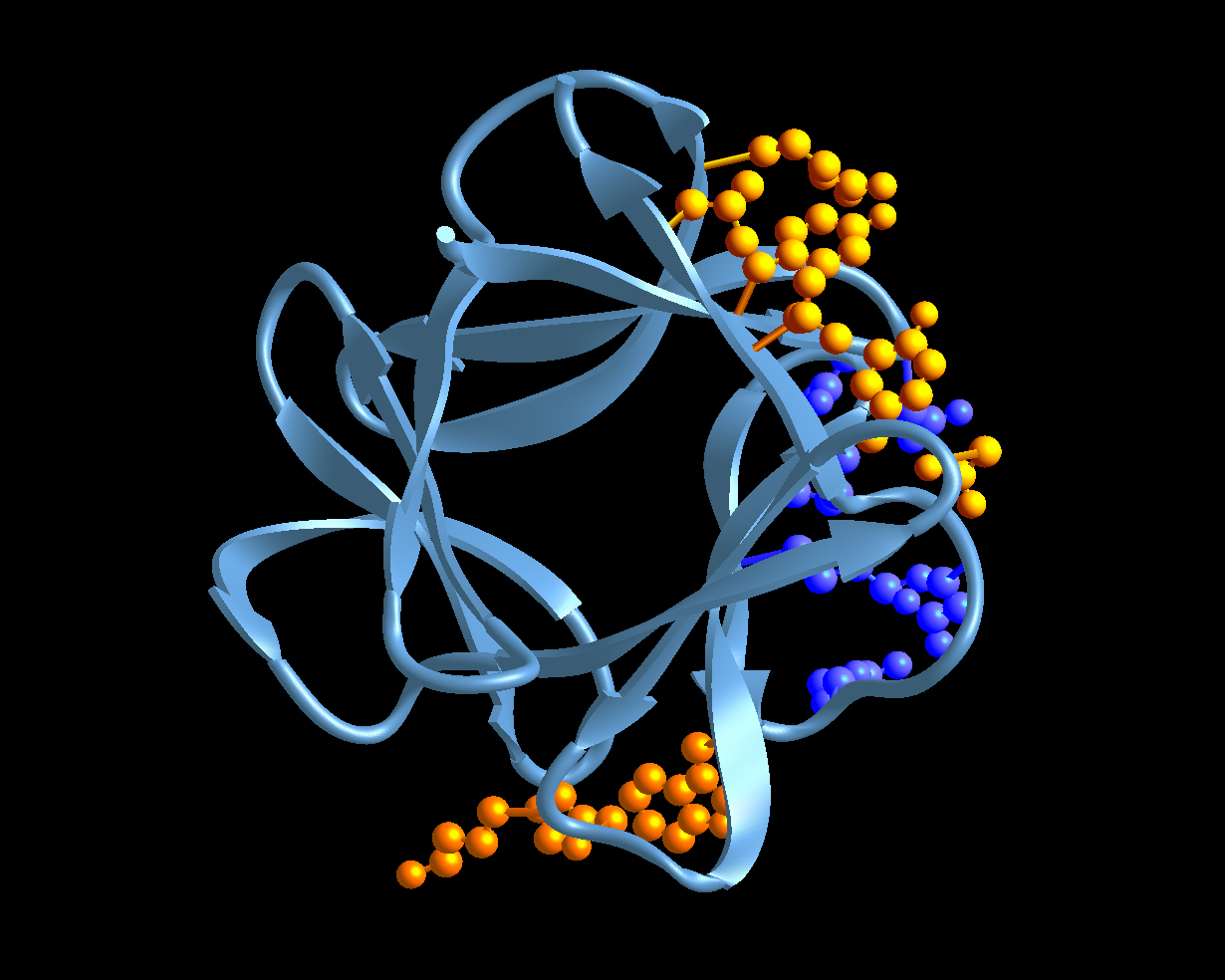 3-dimensionale Struktur des FGF-1 Moleküls